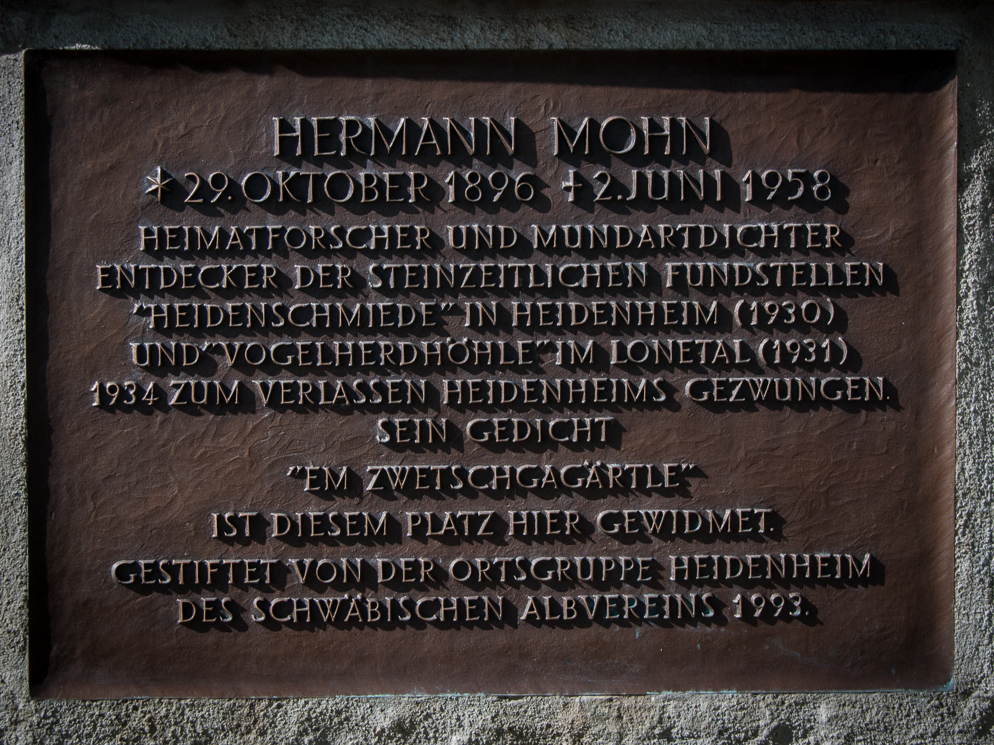 Hermann Mohn Gedenktafel auf Schloss Hellenstein in Heidenheim/Brenz.